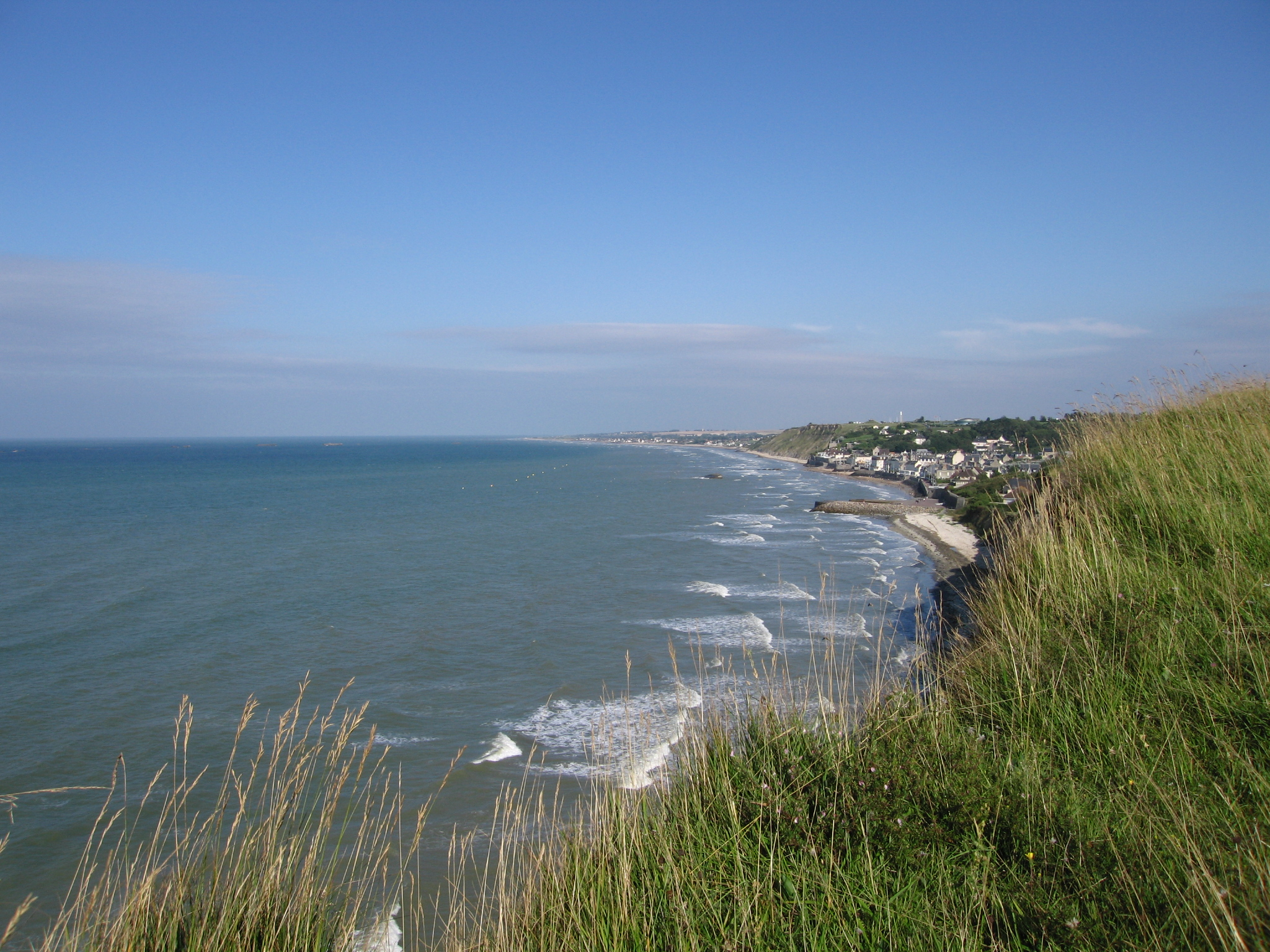 Arromanches vue de Tracy-sur-mer